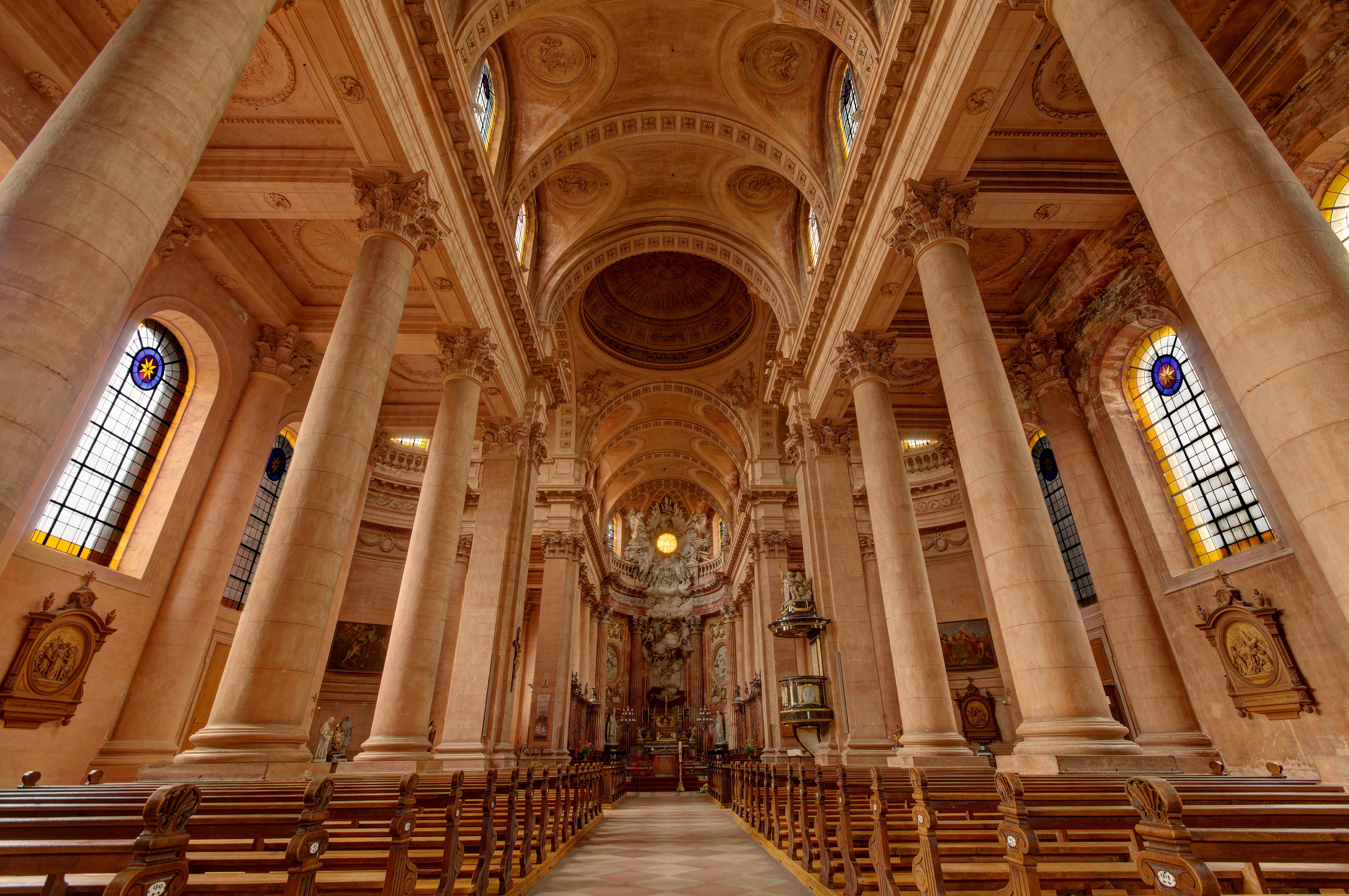 Abbaye de Guebwiller (HDR). Monument classé Monument Historique sous le n° PA00085438.